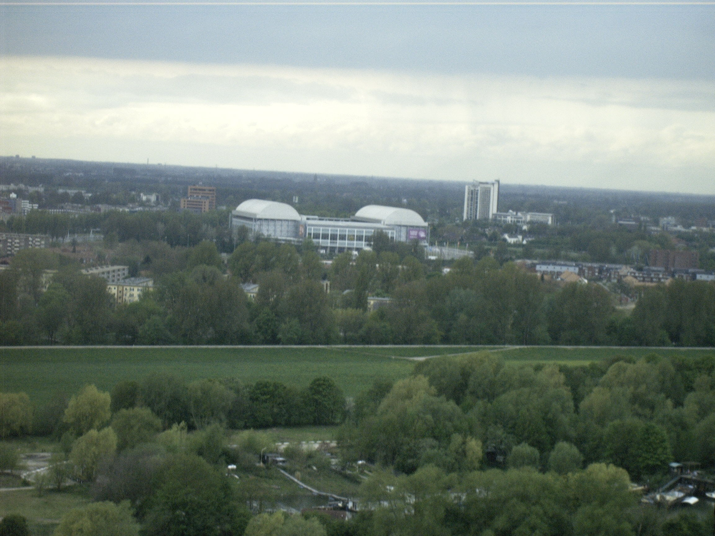 Geldredome gezien vanaf de Eusebius kerk in Arnhem